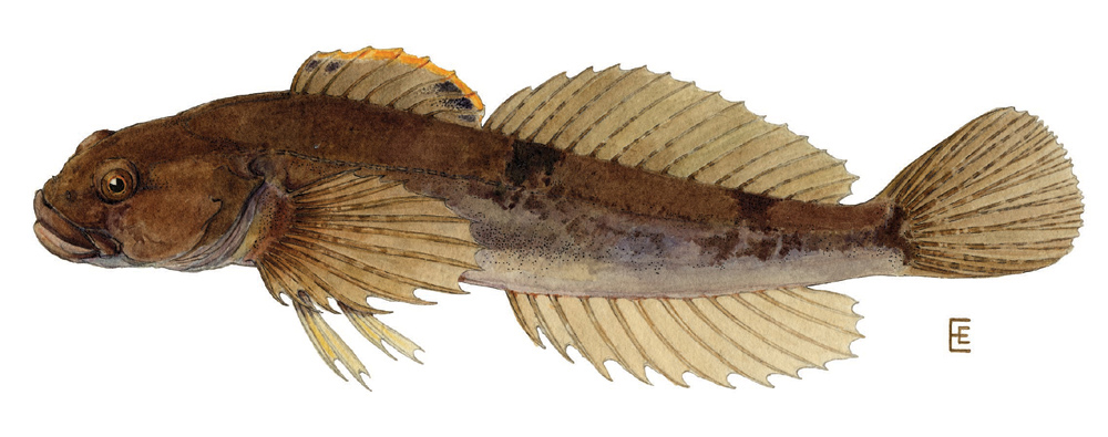 Slimy Sculpin (Cottus cognatus)